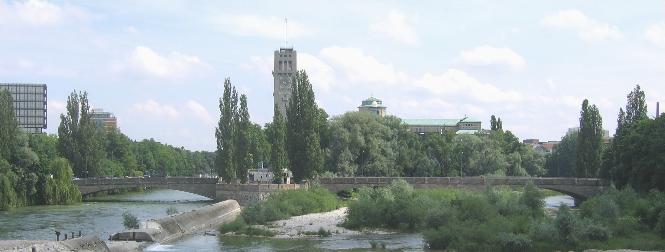 Corneliusbruecke in München, im Hintergrund das Deutsche Museum